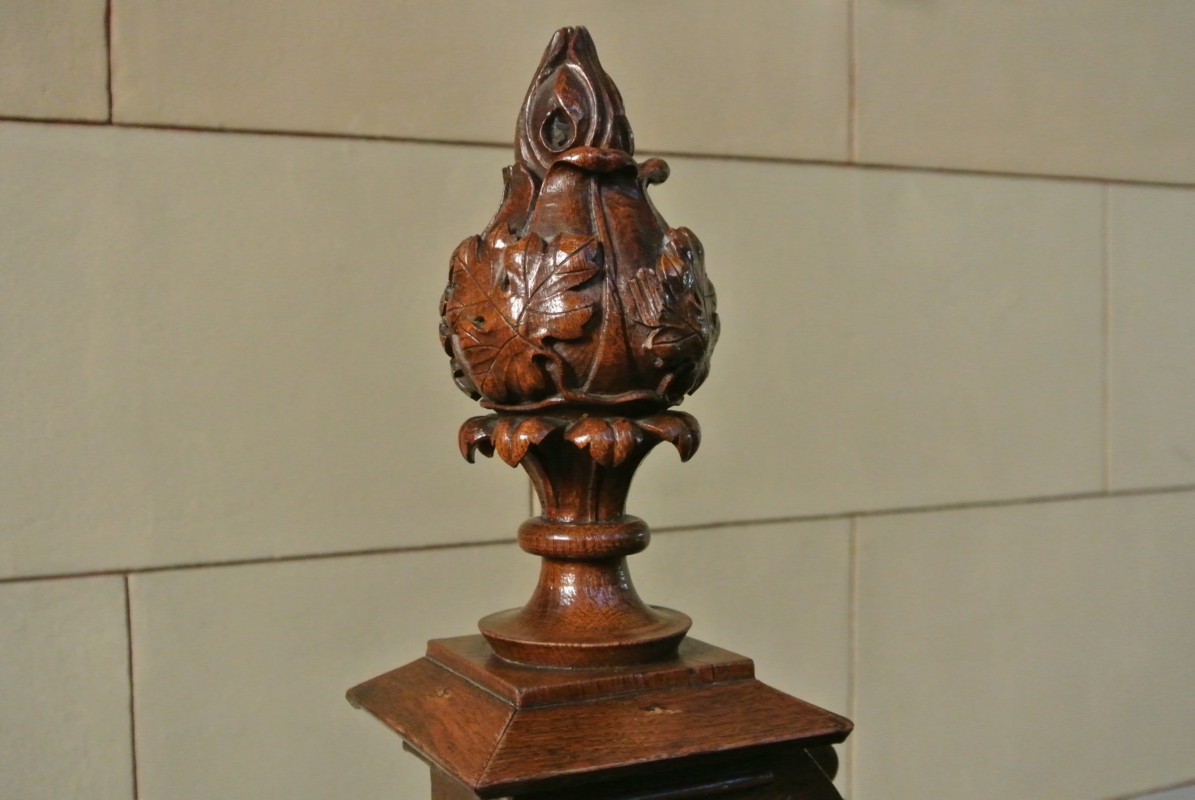 Detajl na prvih in zadnjih klopeh cerkve Srca Jezusovega v Ljubljani.